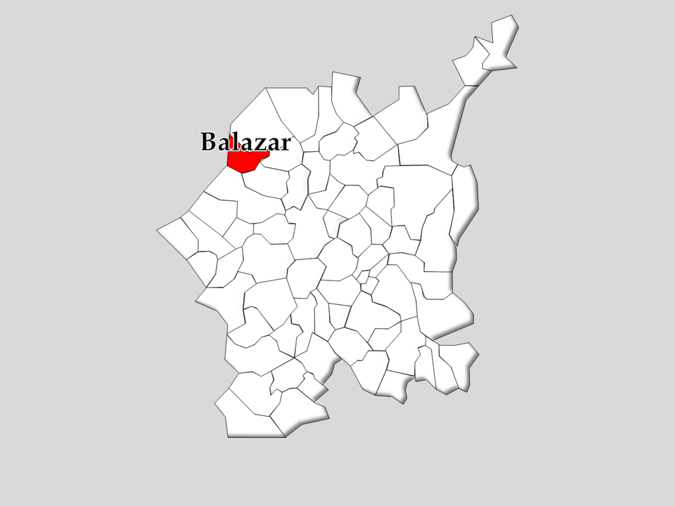 A População em 2001